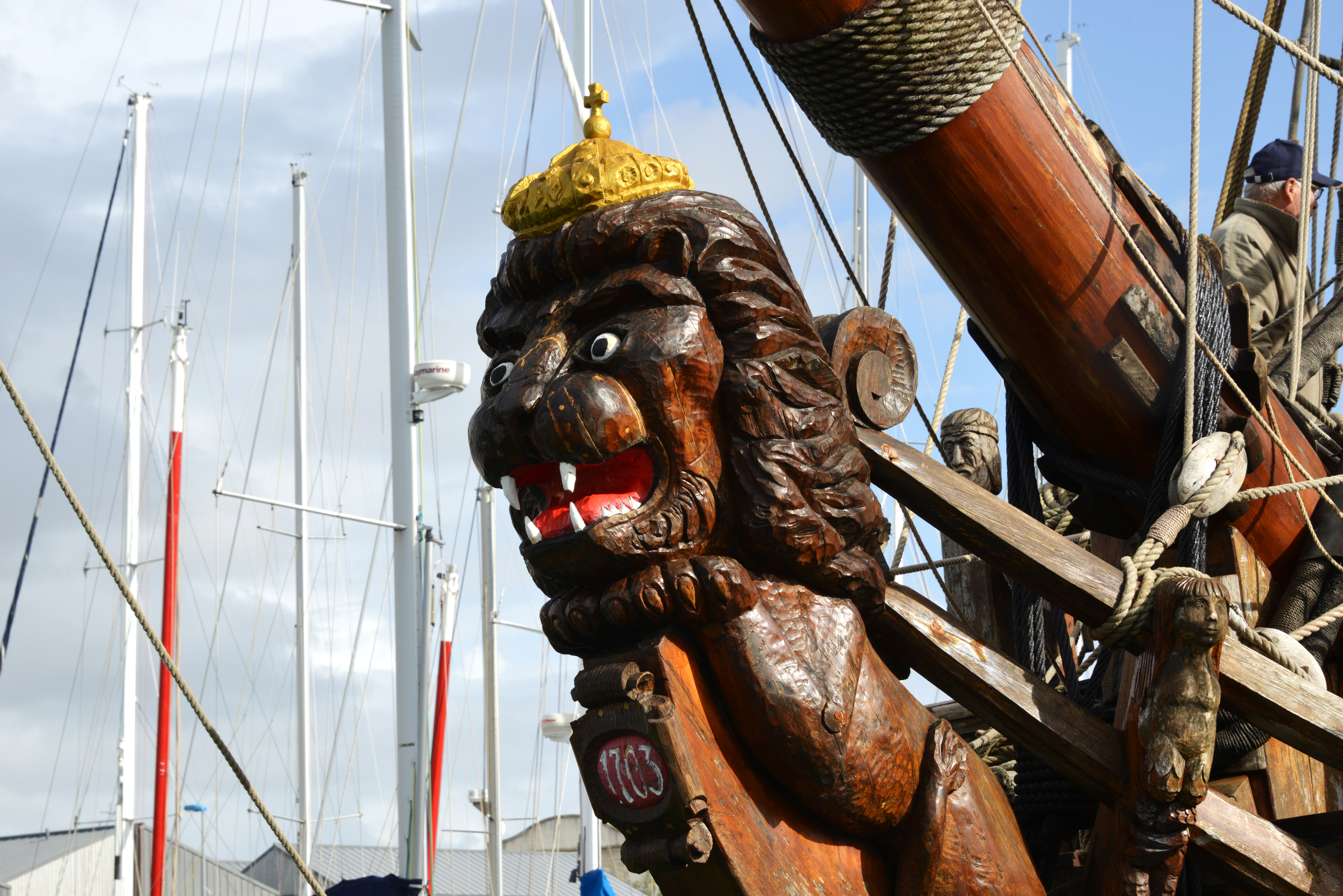 Figure de proue de la frégate russe Shtandart (Штандартъ) amarrée au Quai d’ Honneur dans le Bassin des Chalutiers lors de son escale à La Rochelle en octobre 2013. La Rochelle, Charente Maritime, France.